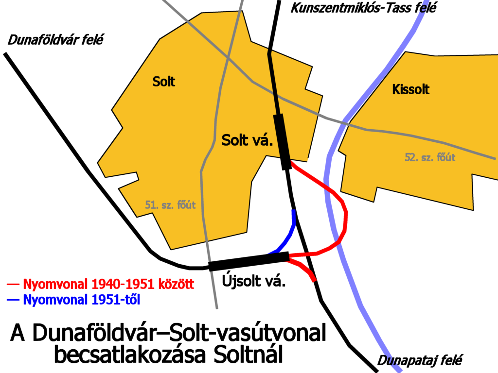 Solt és Újsolt állomások elhelyezkedése, a Dunaföldvár–Solt-vasútvonal becsatlakozása Soltnál